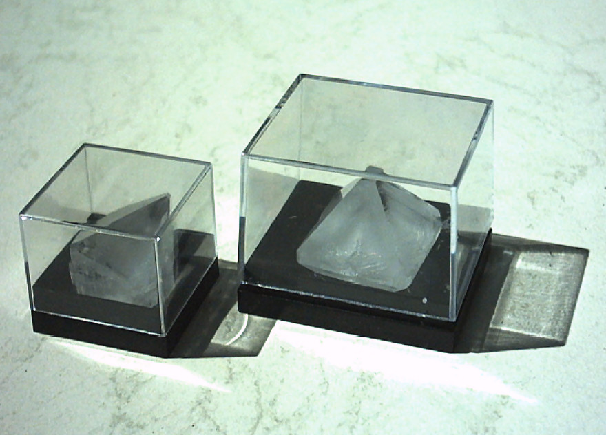 Alaun-Einkristalle mit ca. 2 cm Kantenlänge in idealer Oktaeder-Form als Sammlerstücke. Foto: Eckner, 2006